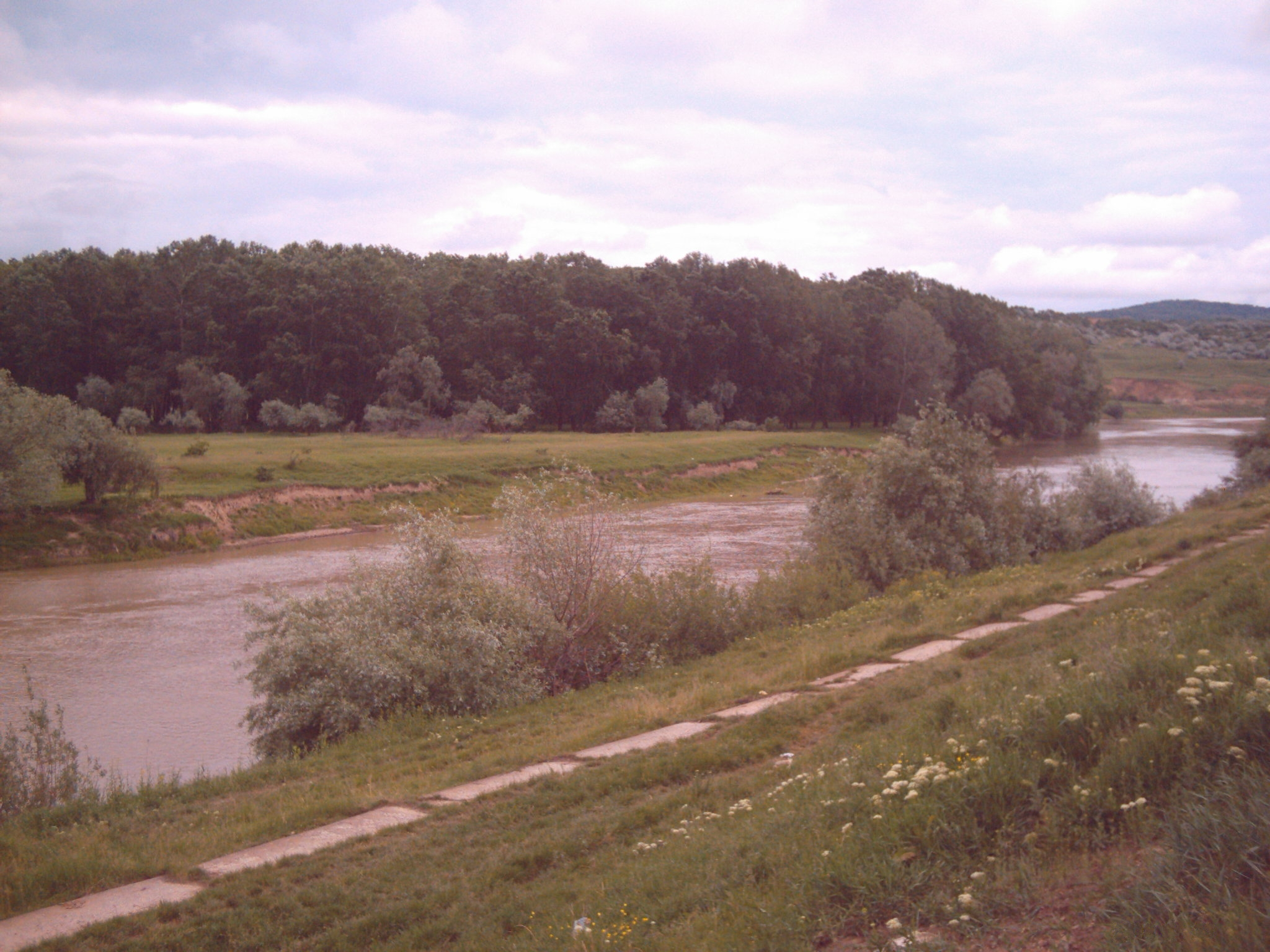 le rivier de siret a roman